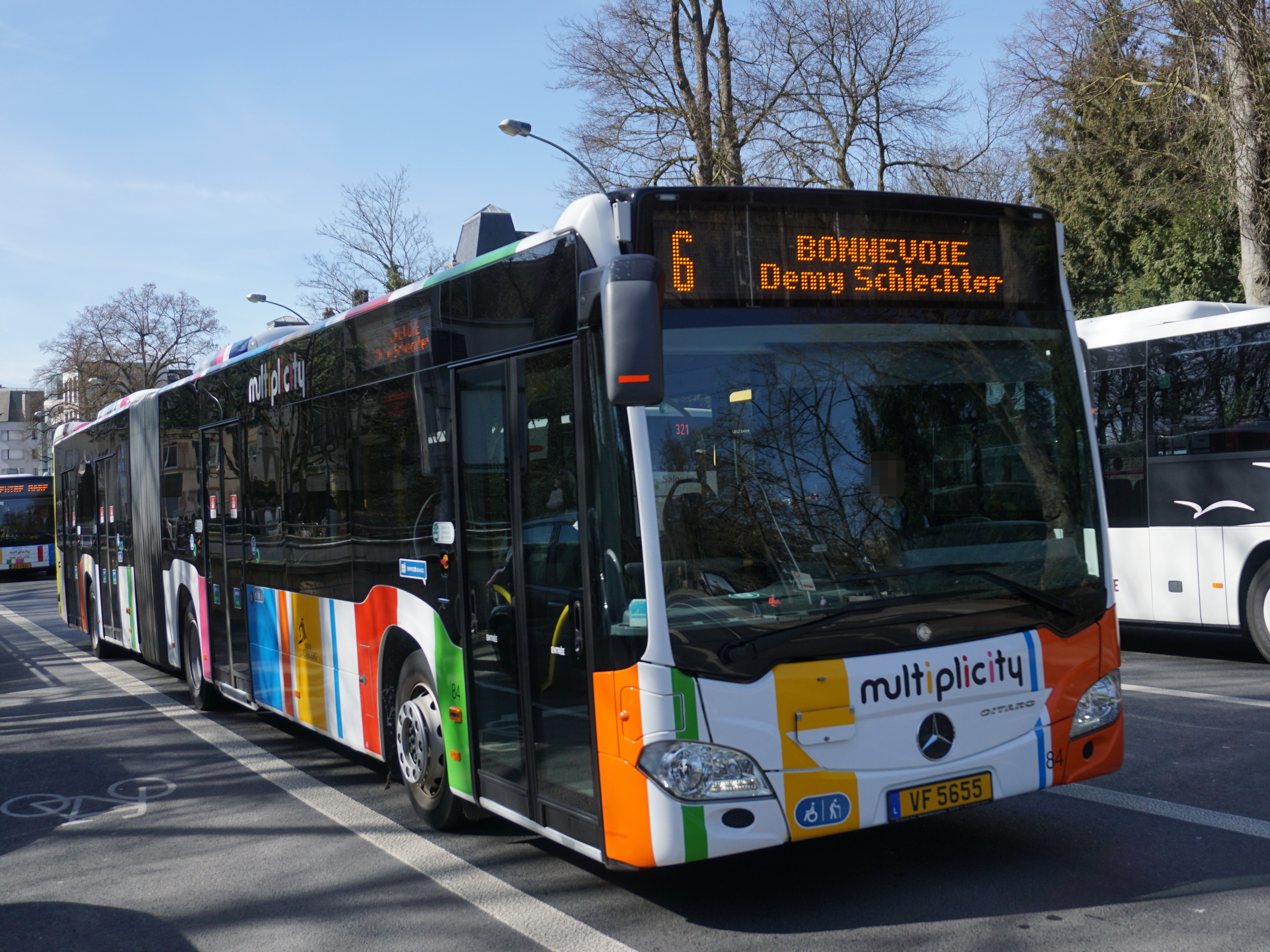 Bus AVL (Autobus de la Ville de Luxembourg) #84 (VF 5655) Marque: Mercedes Fiert an der Av. Monterey op der Linn 6 a Richtung Bouneweg.